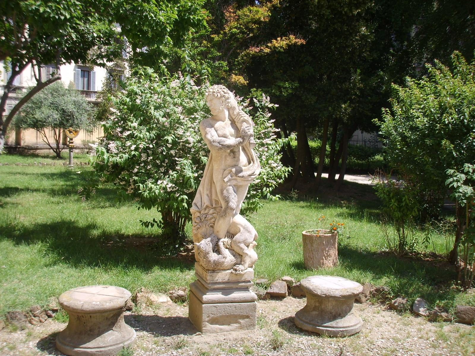 Palazzo Ximenes panciatichi da sangallo, giardino